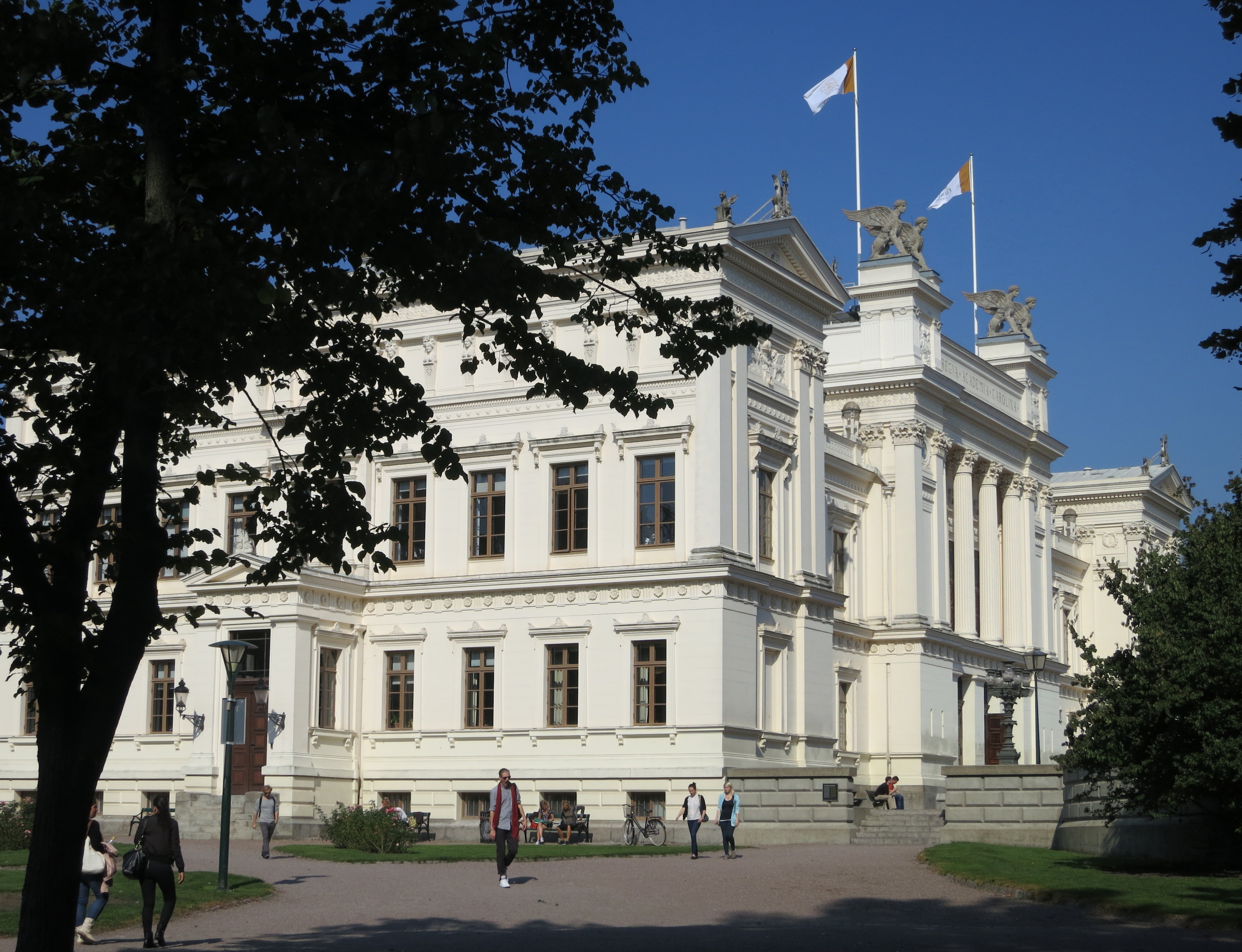 Universitetshuset, Lund (Universitetet 1; f.d. Universitetet 2)